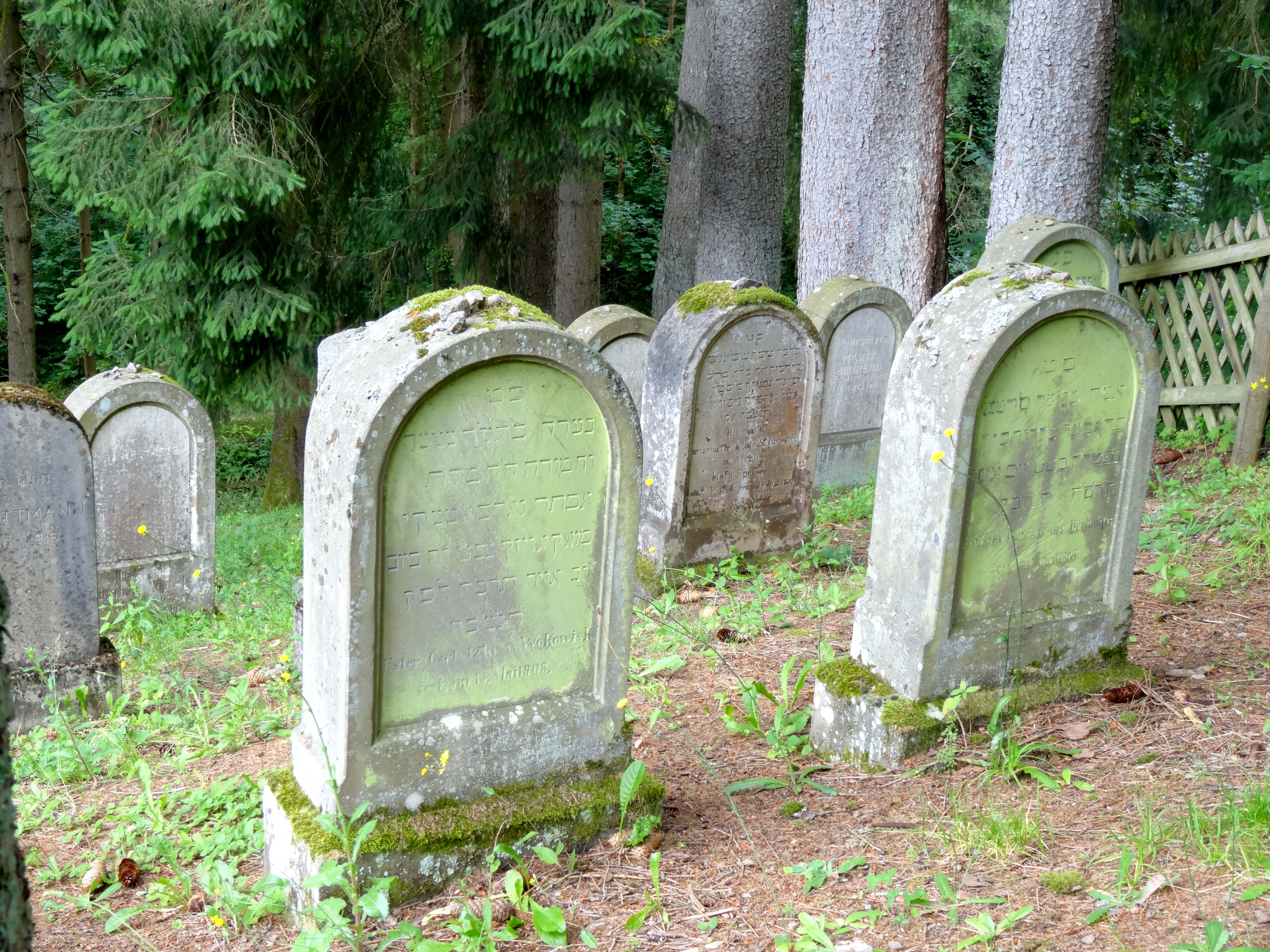 Jüdischer Friedhof Nordrach.